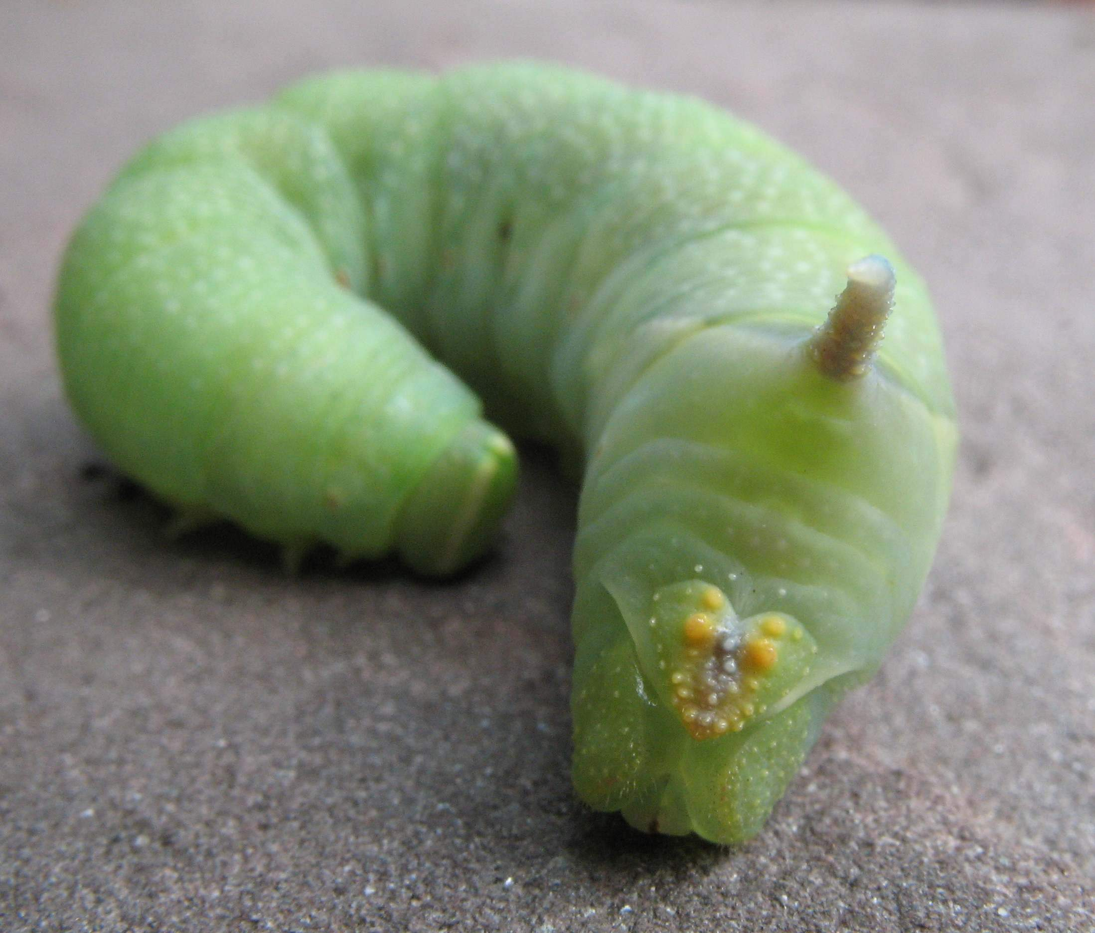 Lindenschwärmer (Mimas tiliae),Raupe, Hinterteil